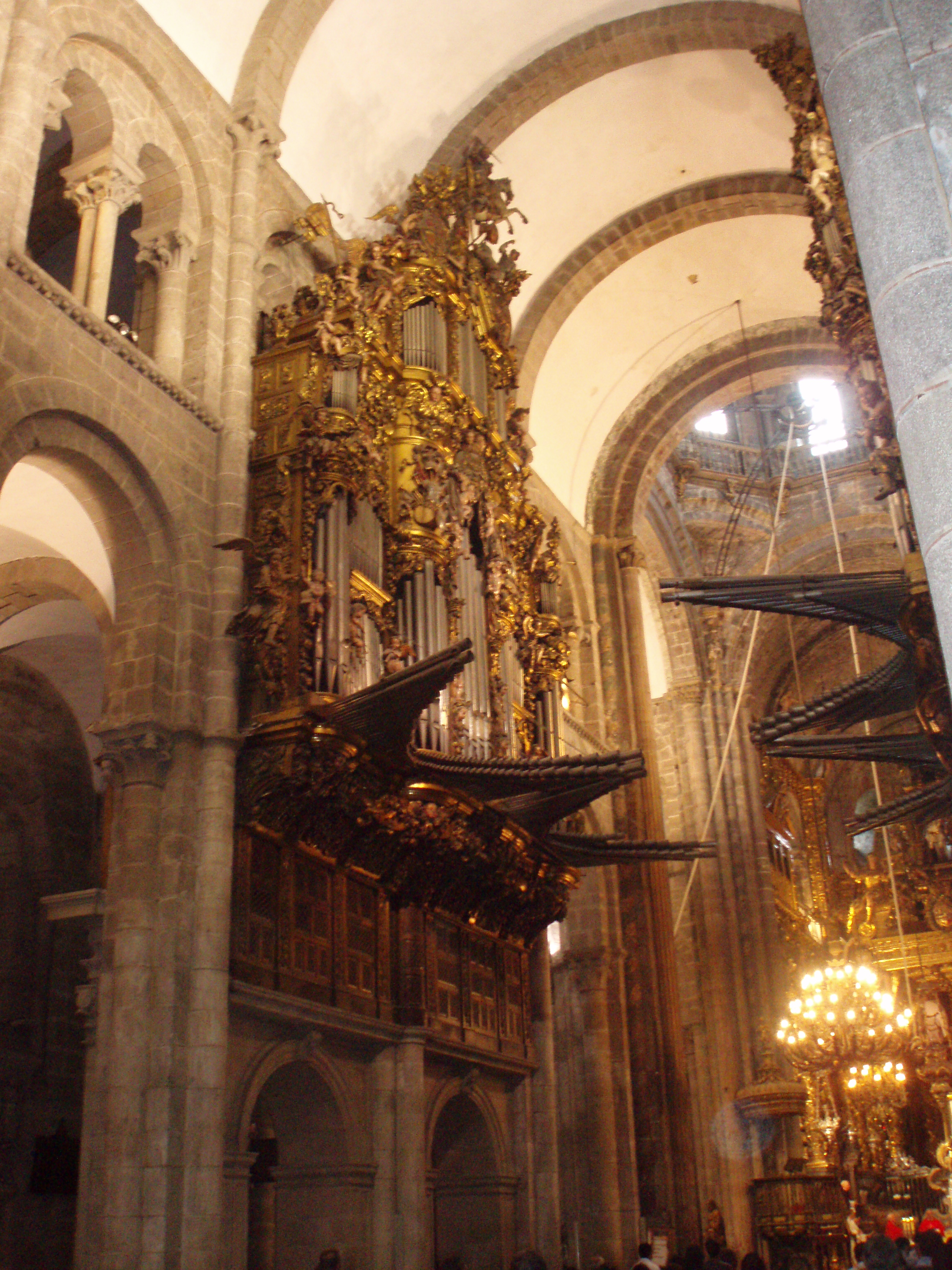 Órgano de la Catedral de Santiago de Compostela.